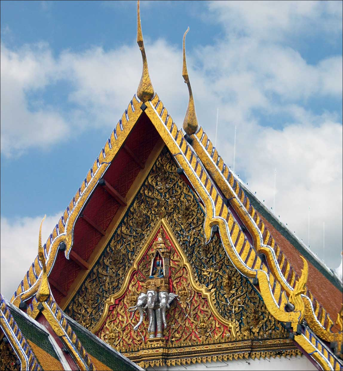 Giebel-Verzierung, Viharn Luang im Wat Suthat, Bangkok 2004 Lizenz/Quelle: H. Damm August 2004